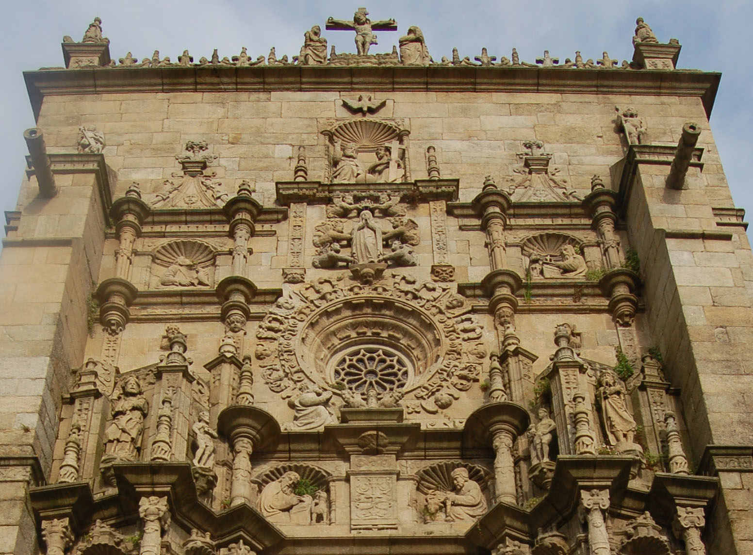 parte superior da fachada da Basílica de Santa María a Maior de Pontevedra Categoría:Imaxes de Pontevedra